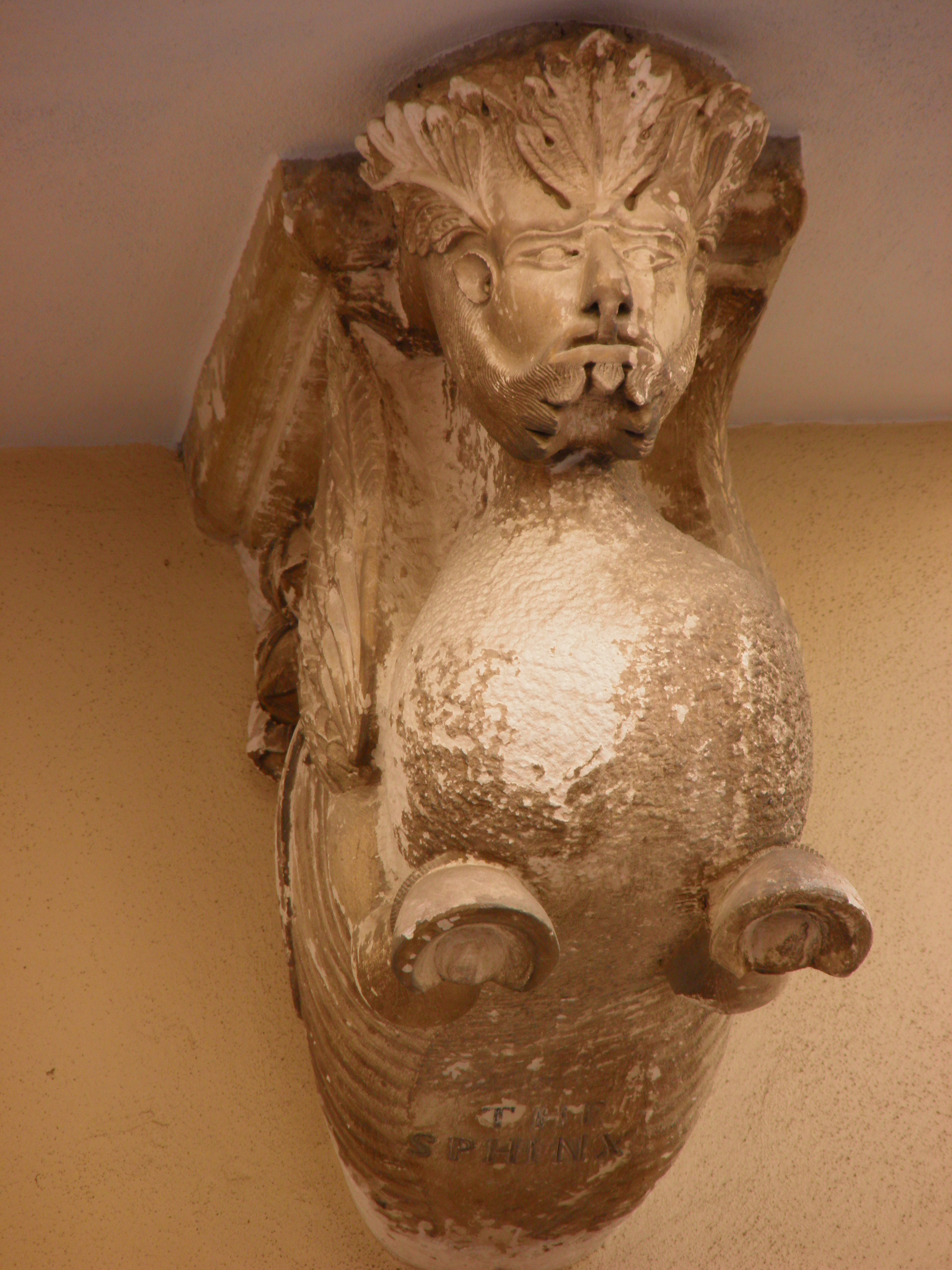 Pegaso con volto umano neo-romanico della loggia massonica John Pitkin di Monopoli